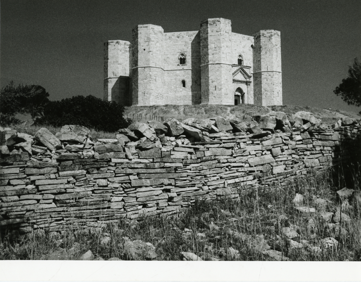 Serie fotografica : Andria, 1970 / Paolo Monti. - Stampe: 2 : Positivo b/n, gelatina bromuro d'argento/ carta, 24x30. - ((Al verso delle stampe manoscritto numero di negativo corrispondente: 1182/25, 1183/11, 1183/15, 1487/32. Al verso di una delle stampe manoscritto: "Sannicandro di bari Antico castello svevo ora casa popolare". Sul coperchio della scatola manoscritto a pennarello nero: "Puglie/ Architettura". - Occasione: Documentazione per la pubblicazione di: Calò Mariani Maria Stella, "L'arte del duecento in Puglia", Torino, Istituto Bancario San Paolo, 1984. - , presso Archivio Paolo Monti. - Fonte: Agenda di Paolo Monti: Monti - Agenda 1970 (1970)